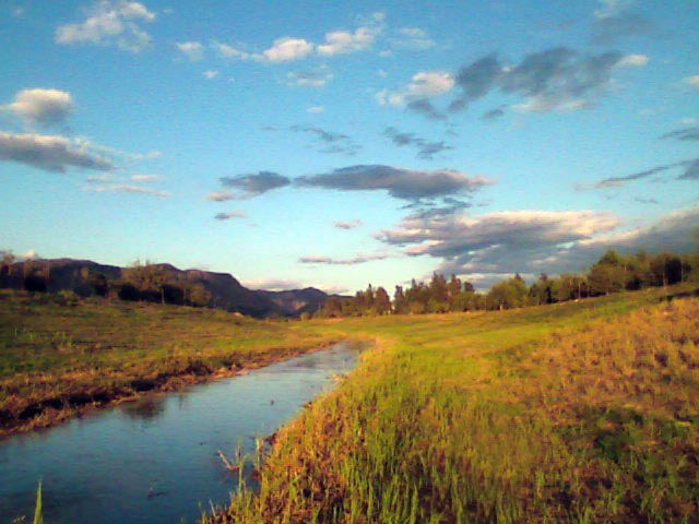 Río Segura, a su paso por Desamparados (Orihuela), al sur de la Comunidad Valenciana (España)